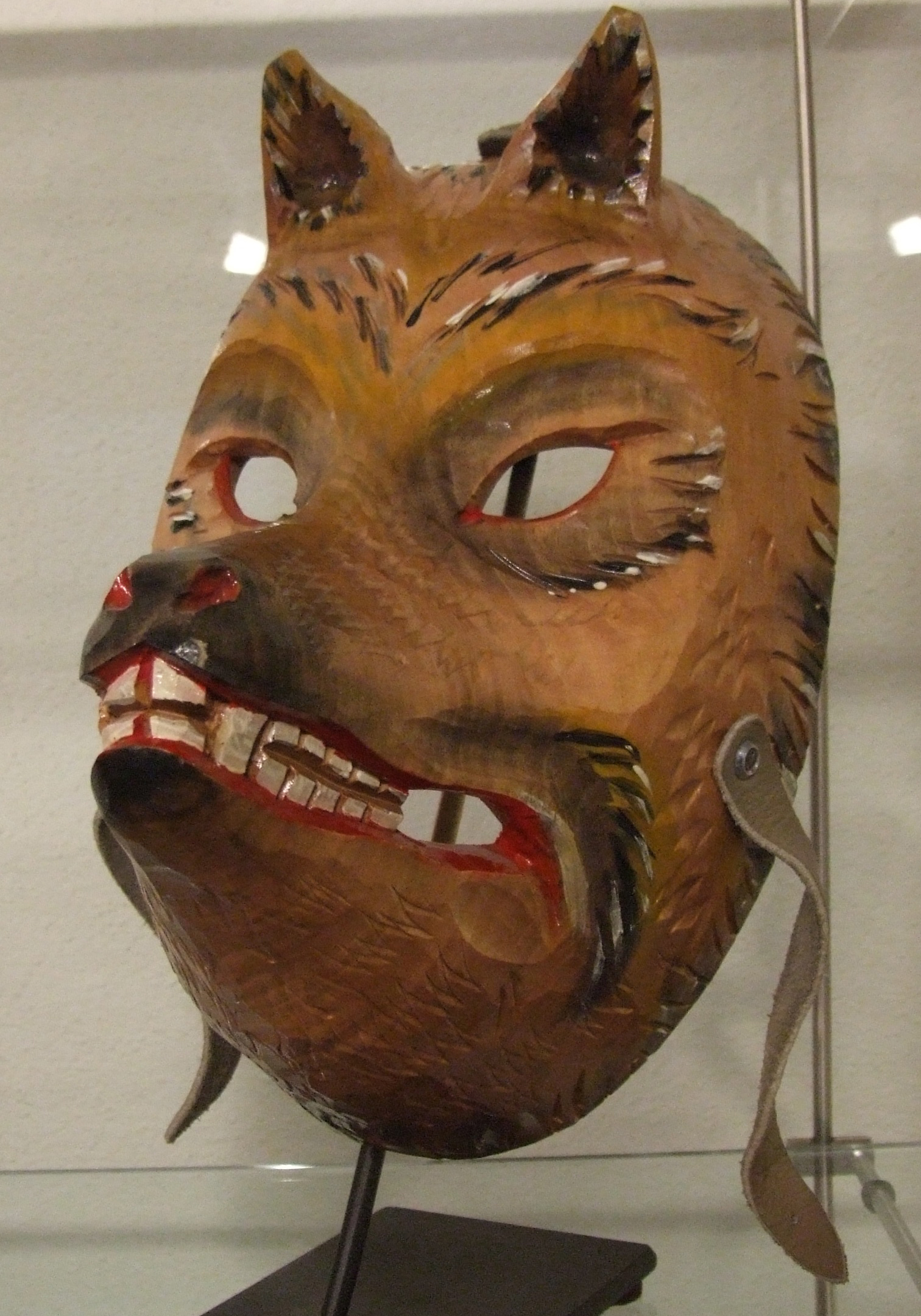 Fuchsmaske aus Elzach, eine lokale Fasnachtsfigur, geschnitzt aus Lindenholz von Franz Lang, aufgenommen bei der Jubiläumsausstellung des Fasnachtsmuseums Speyer